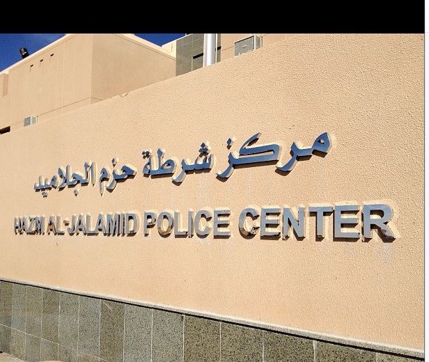 صورة لمركز الشرطة في حزم الجلاميد